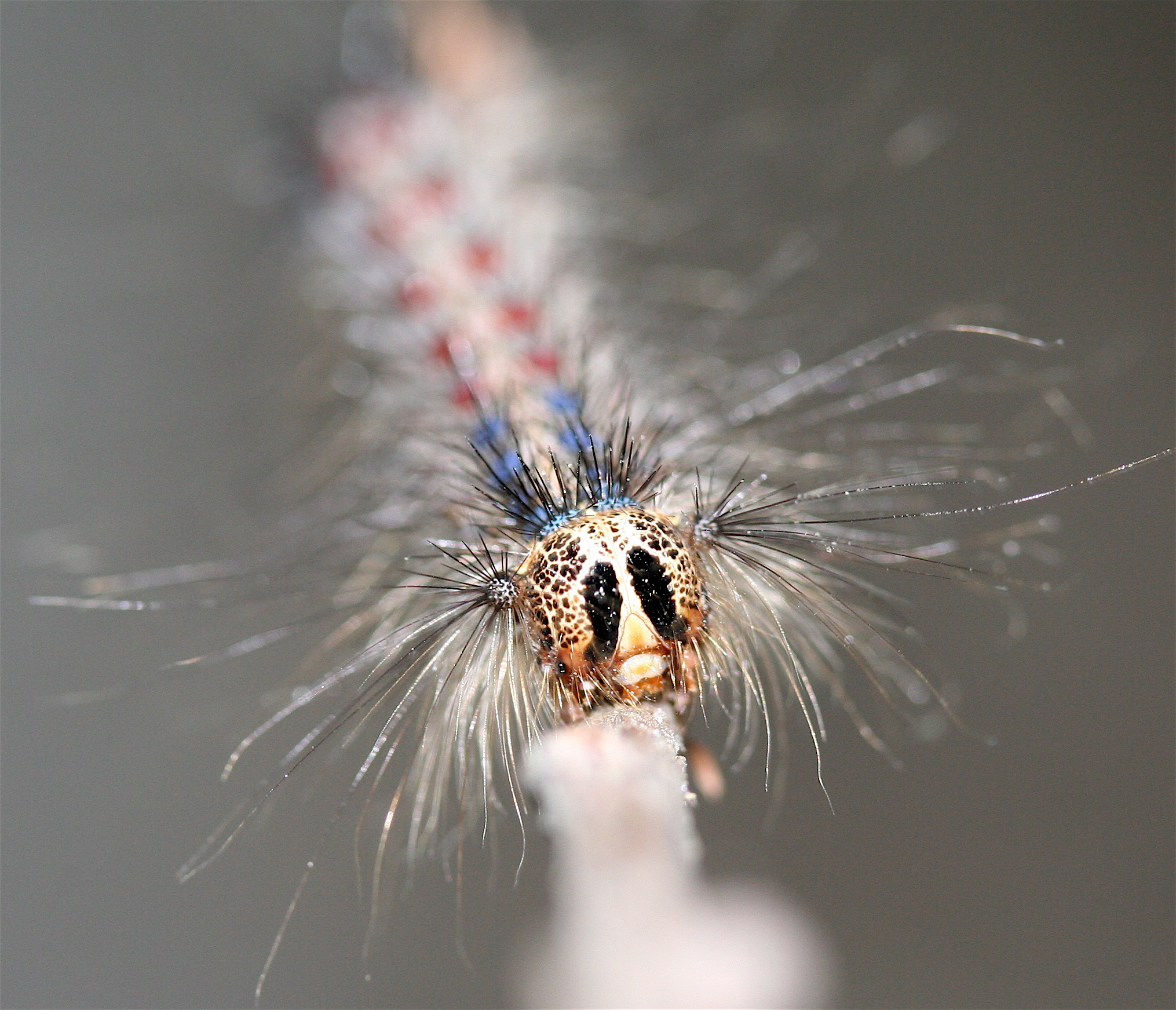 Lepidoptera - Caterpillar